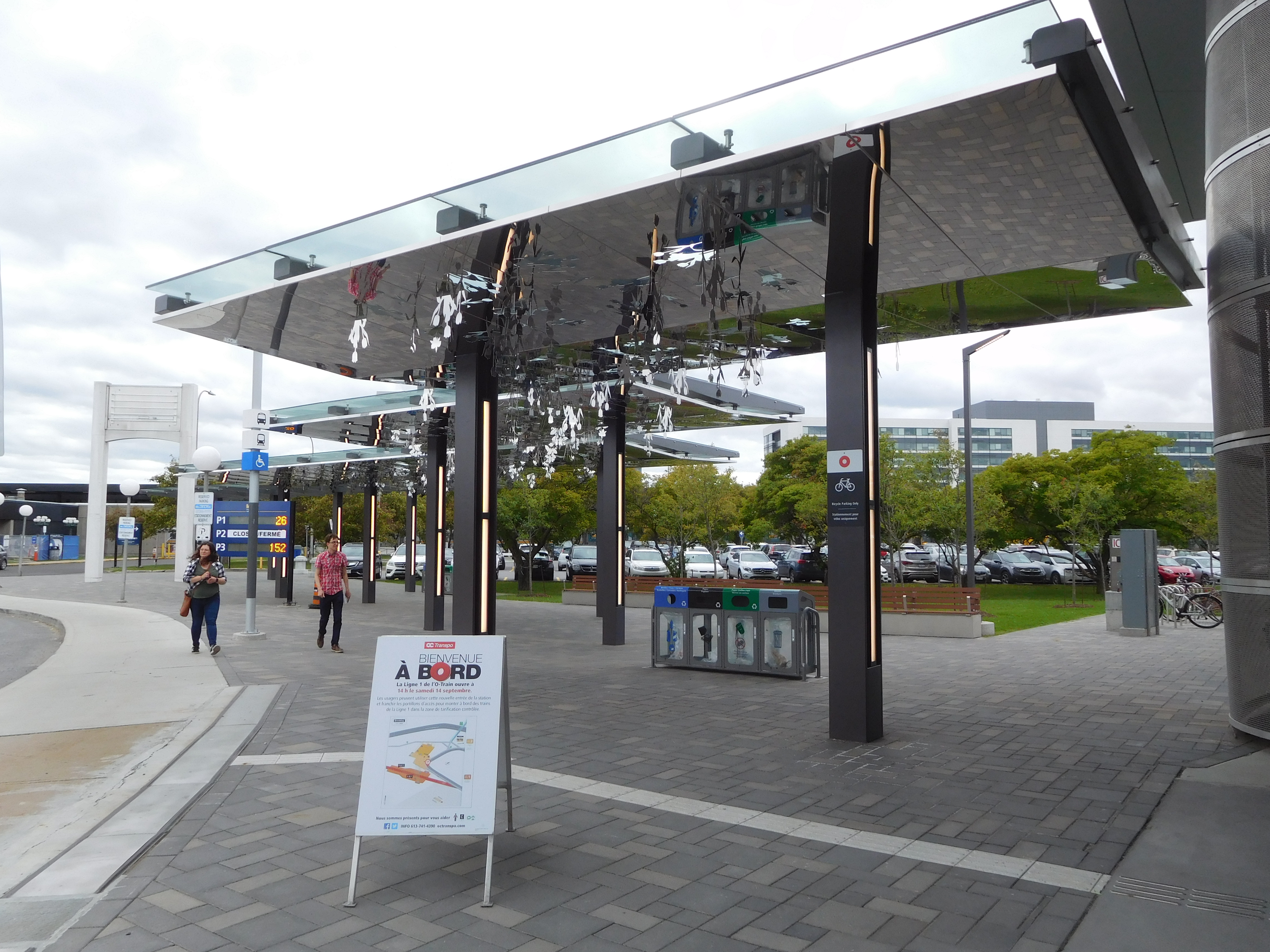 Station Tremblay de la ligne de la Confédération à Ottawa